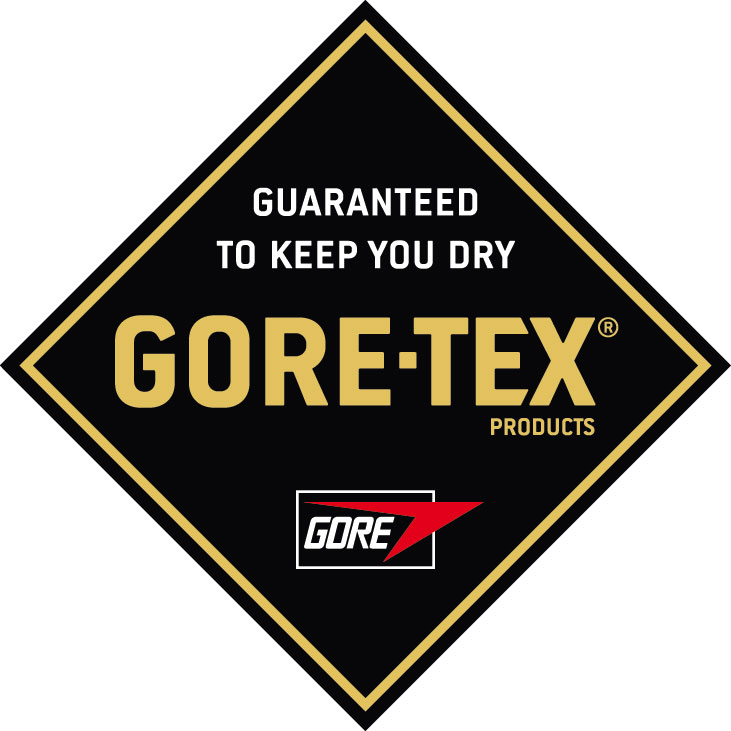 Offizielles GORE-TEX® Logo